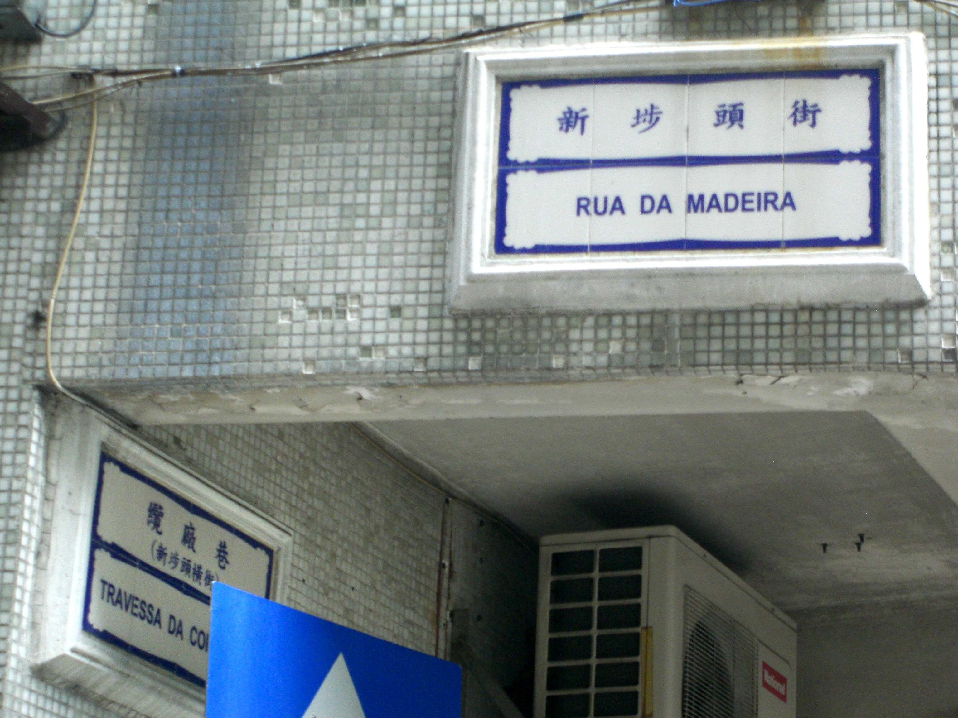 Rua da Madeira e Travessa da Cordoaria